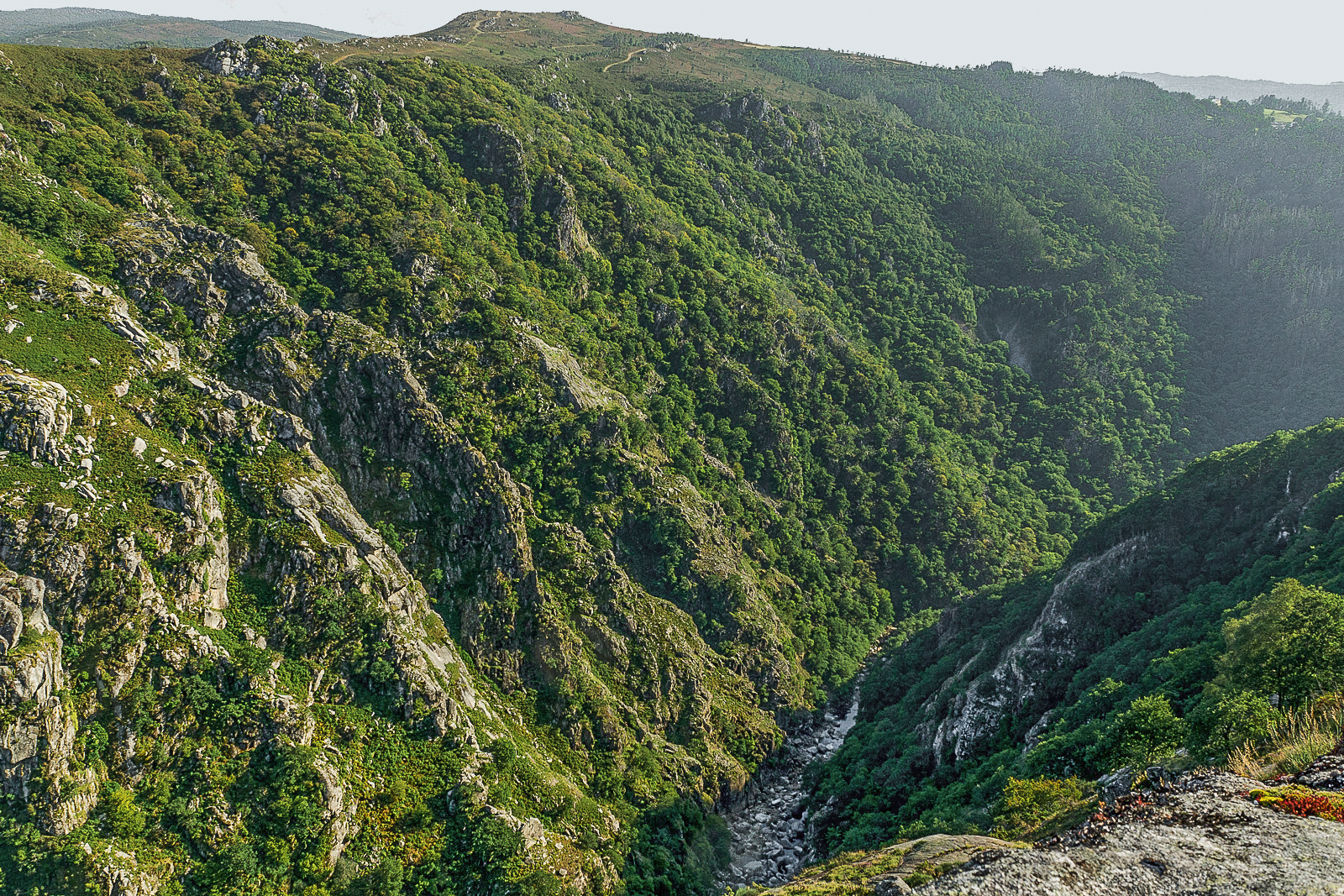 Fragas do Eume.